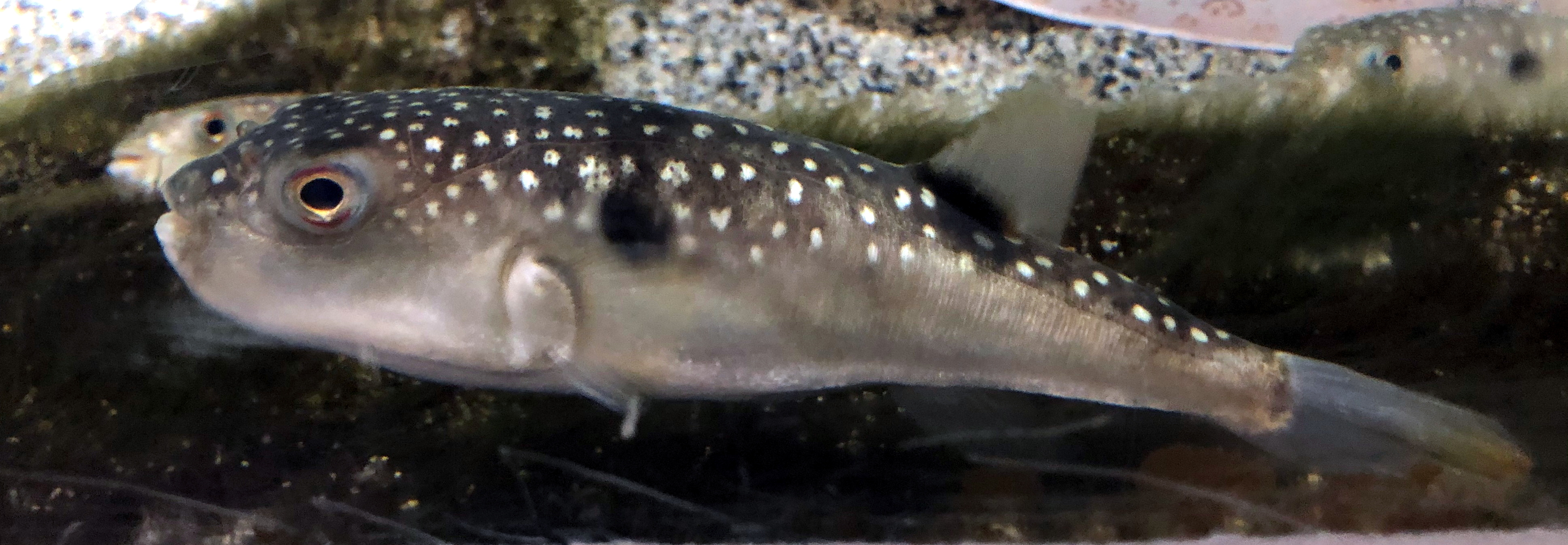 クサフグ。新潟市水族館 マリンピア日本海飼育展示個体。